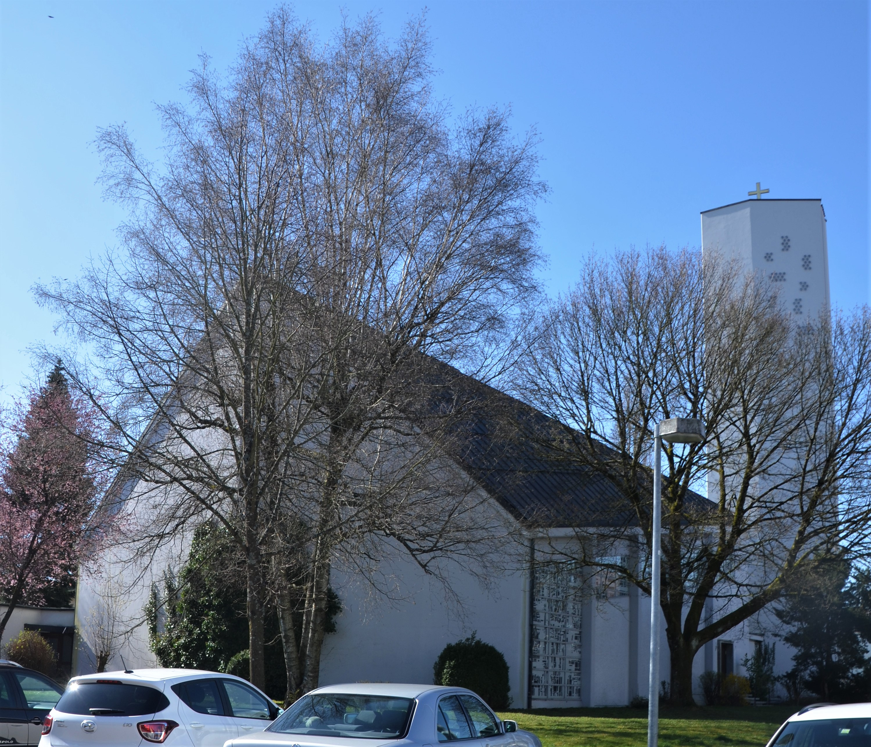 Maria Königin in Schwäbisch Gmünd-Rehnenhof, Ostansicht